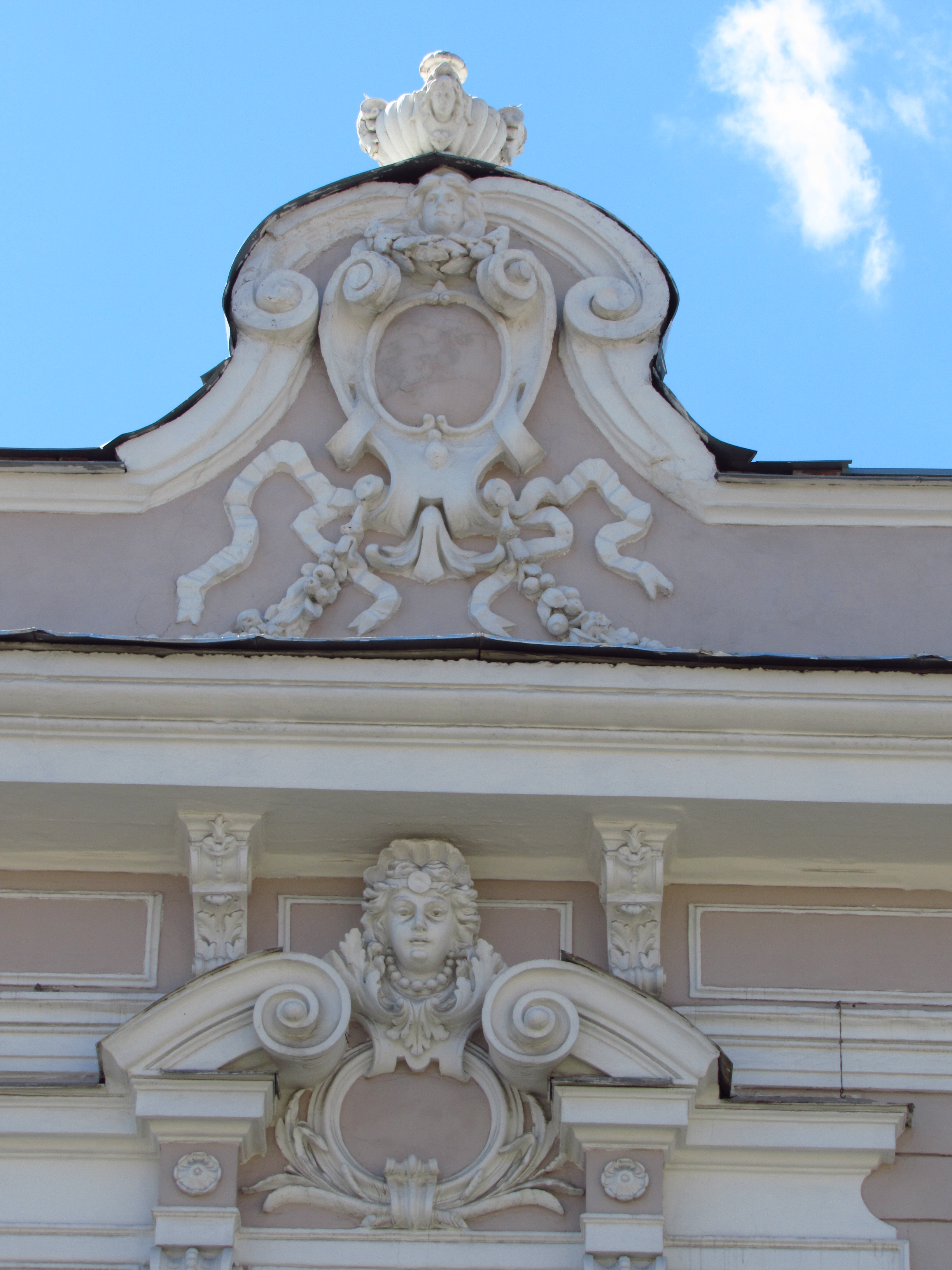 Прибутковий будинок страхового товариства «Життя», Харків, вул. Сумська, 19